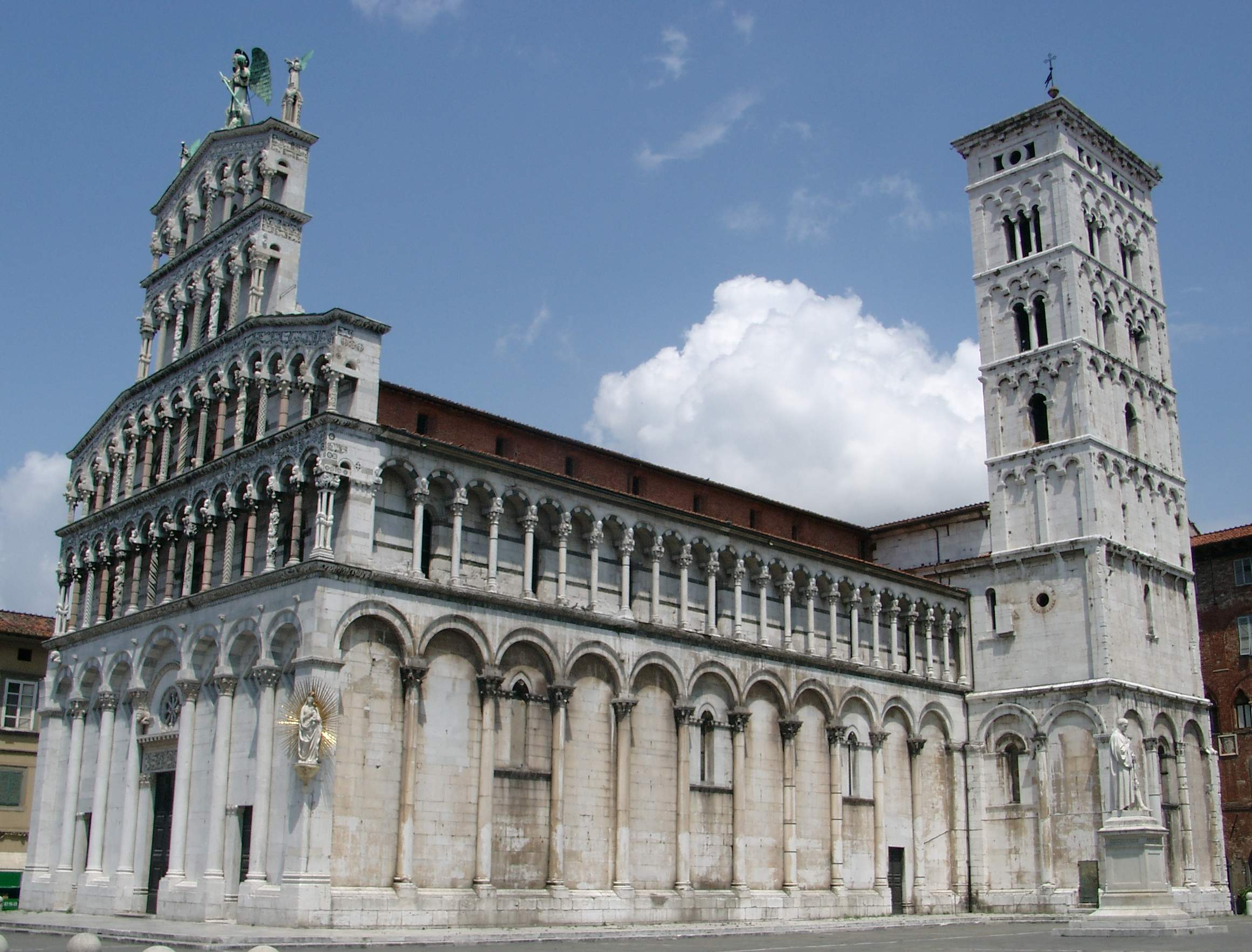 eigenes Photo, Juni 2005